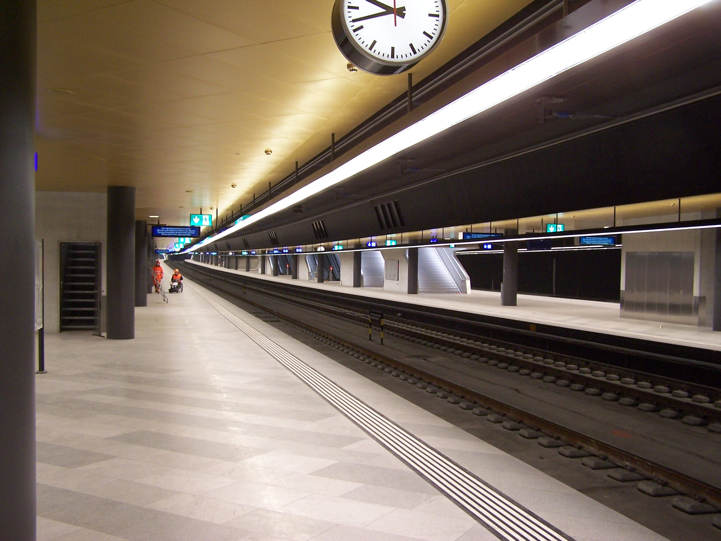 Bahnsteigebene im Bahnhof Löwenstrasse mit Blick in Richtung Weinbergtunnel.